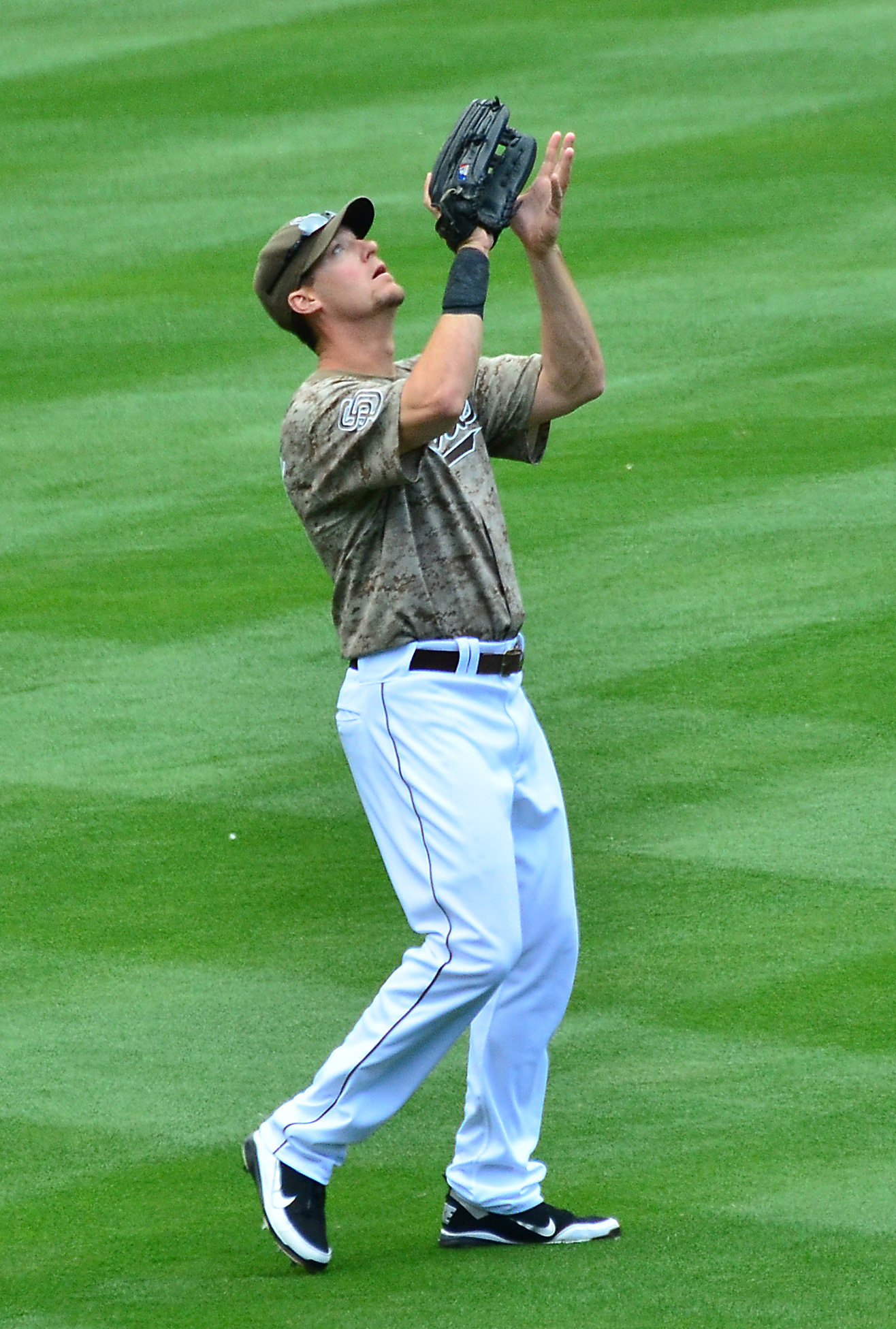 Ryan Ludwick